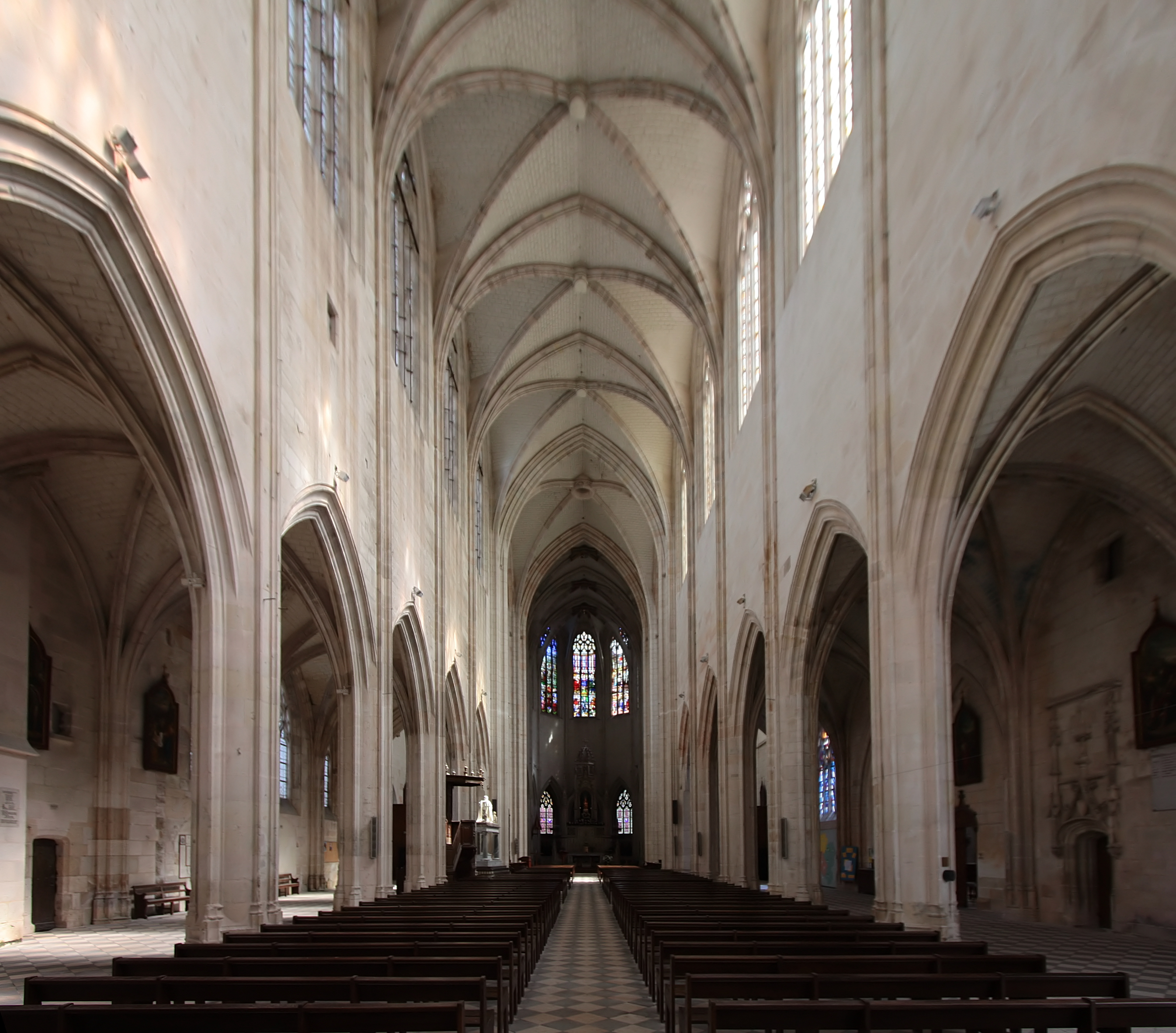 Kirche Notre-Dame de Cléry in der Gemeine Cléry-Saint-André, Département Loiret/Frankreich - Langhaus